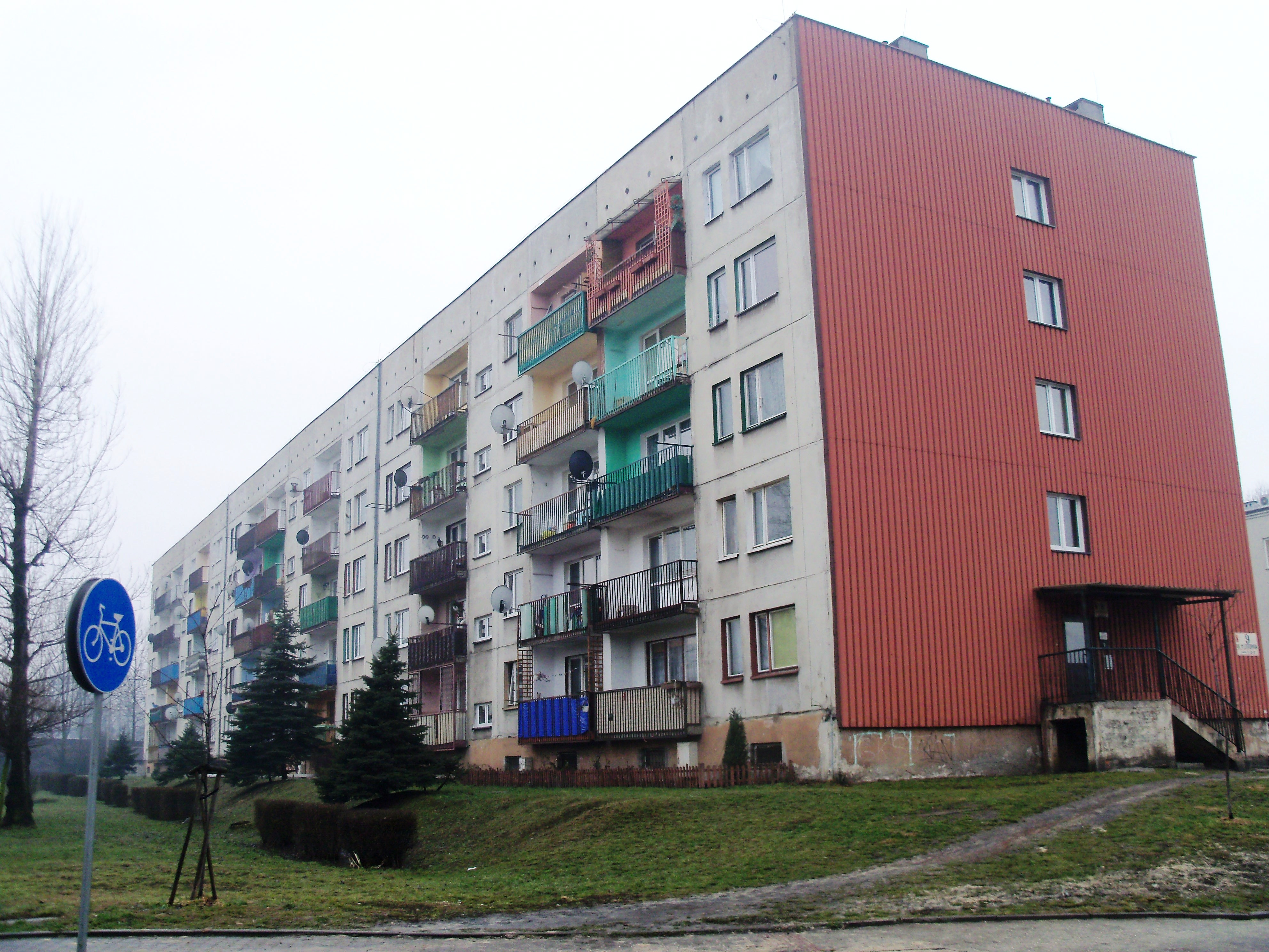 Budynek przy ul. 11 Listopada 9 w Katowicach-Szopienicach